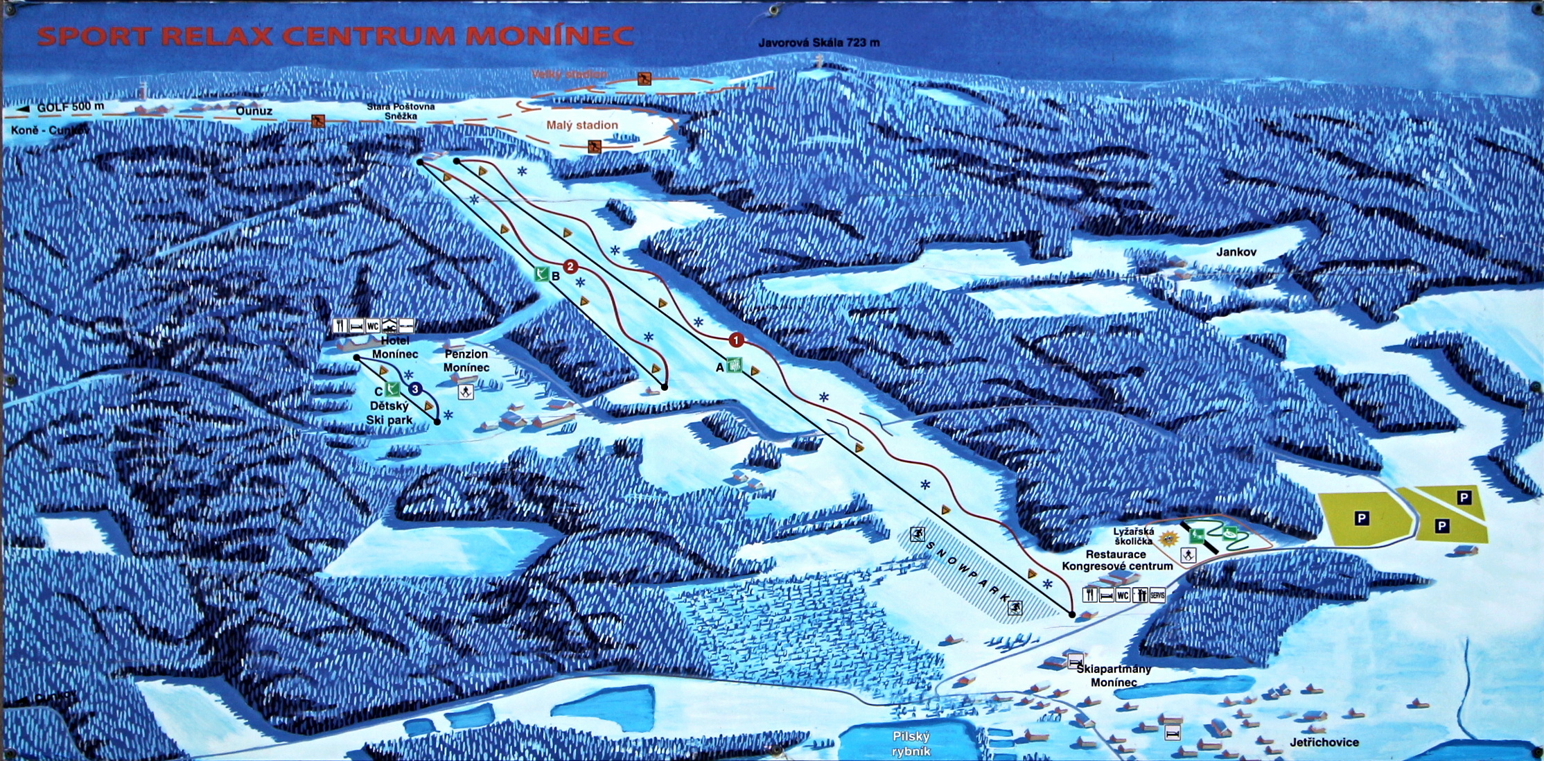 Ski resort Moninec